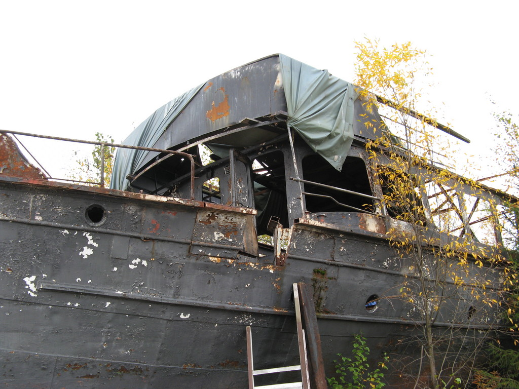 S/S Pohjola Jäminkipohjassa lokakuussa 2007.